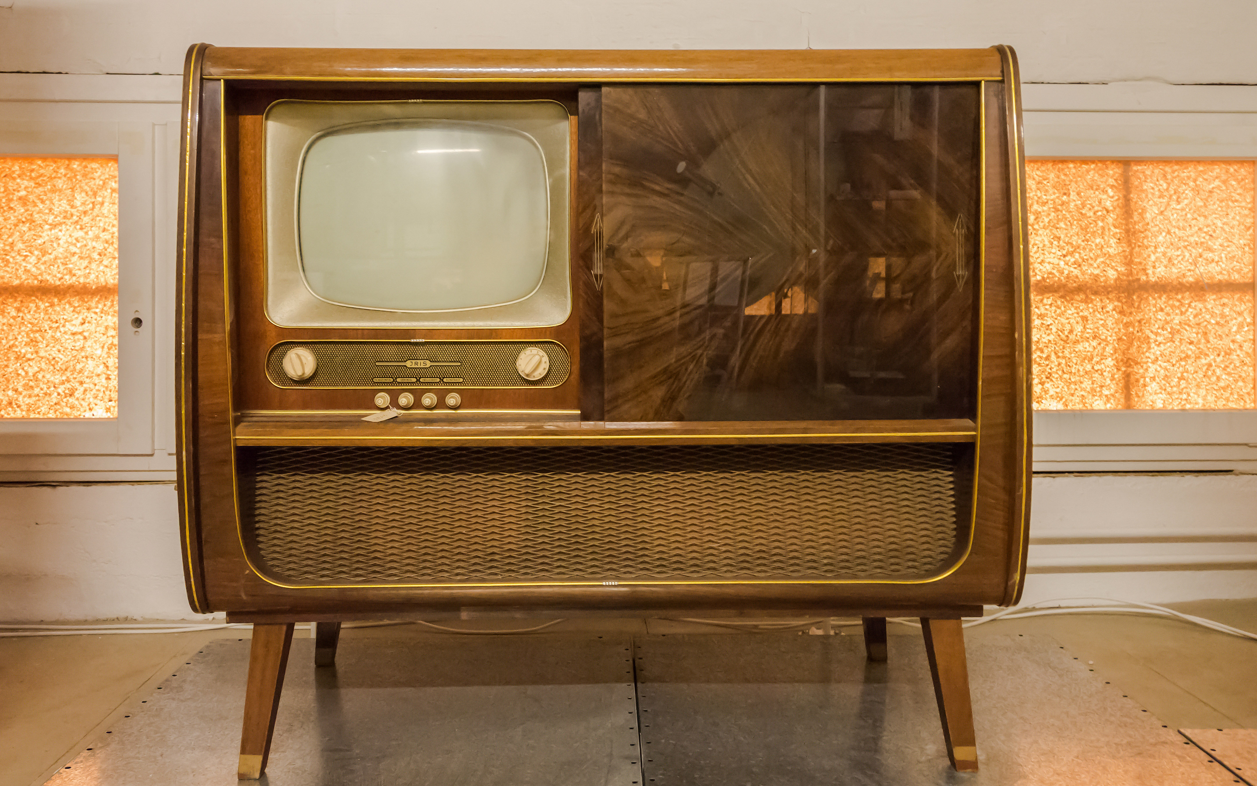 TSD Depot Unterhaltungs-, Ton-, Radio- und Fernsehtechnik , RFT Musikschrank Stassfurt Röhren Fernseher Radio Tonband I